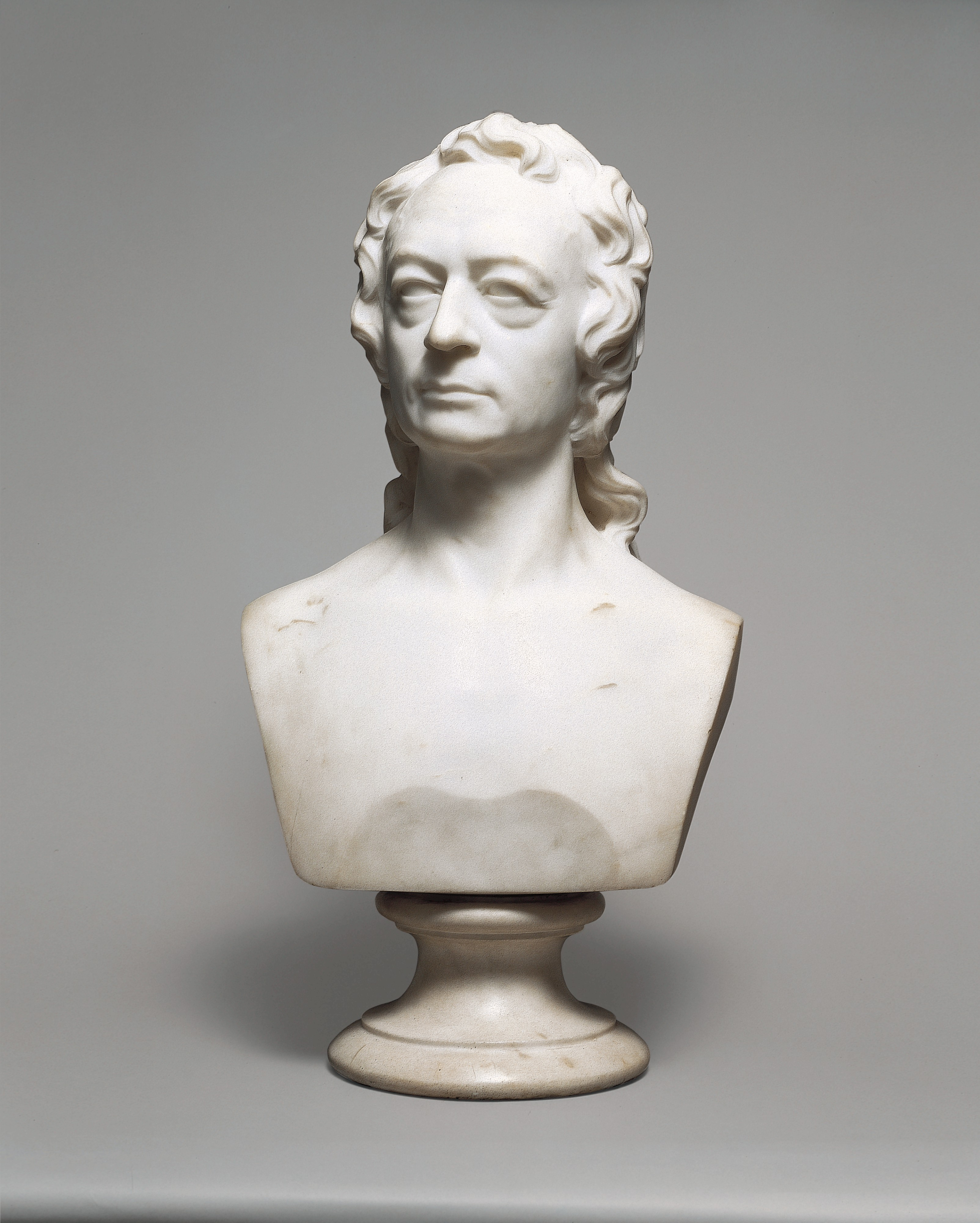 Bust; Sculpture